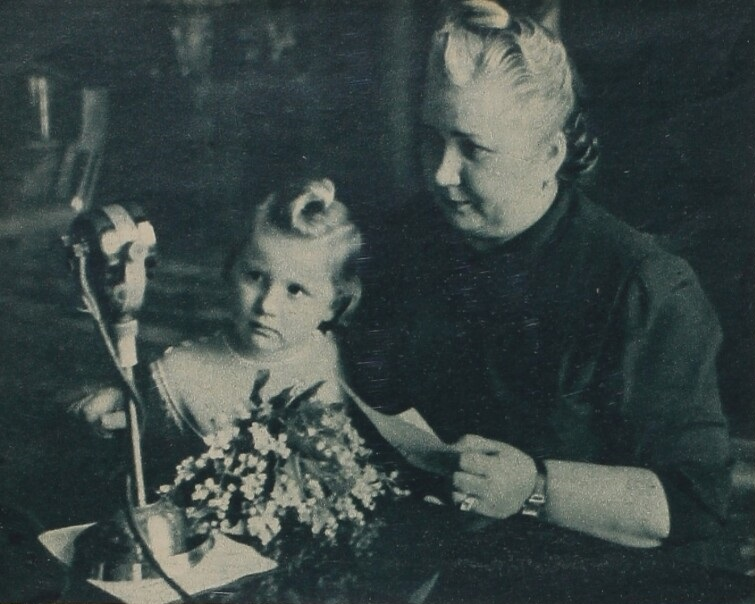 Vlasta - vydáno 17.3.1949